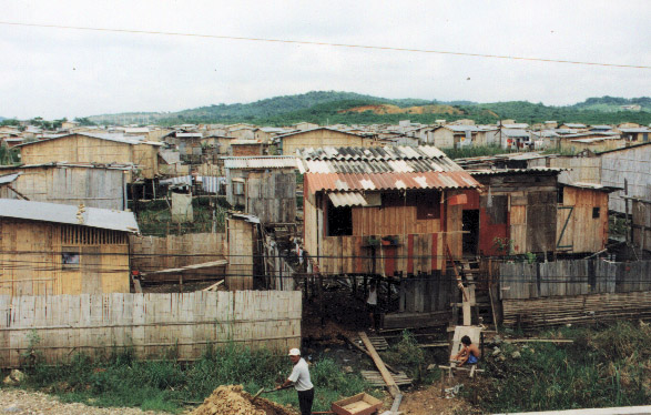 Parte baja de Bastión Popular, antes del inicio de las acciones del Programa ZUMAR Autor: Equipo ZUMAR Fecha: 2002